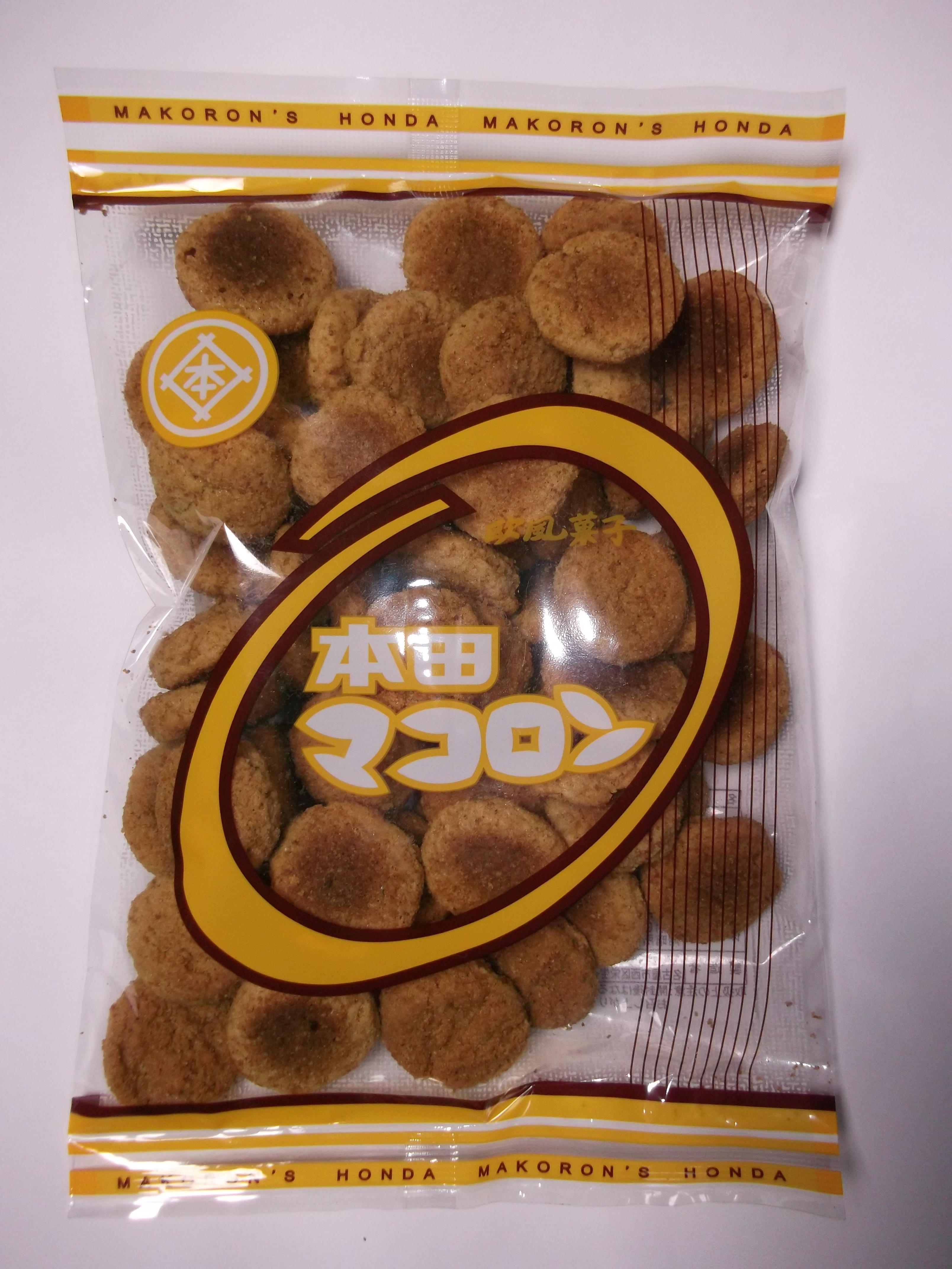 名古屋市西区栄生のマコロン製菓の製品「マコロン」